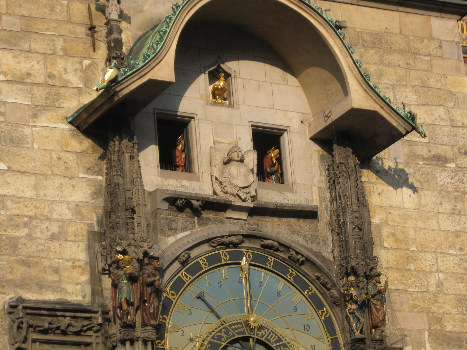 Пражские куранты. Бой, проход апостолов.